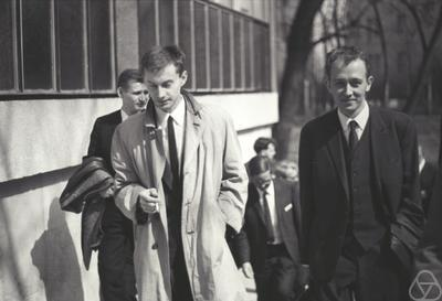 Bohuslav Diviš und Břetislav Novák, Debrecen, 1968